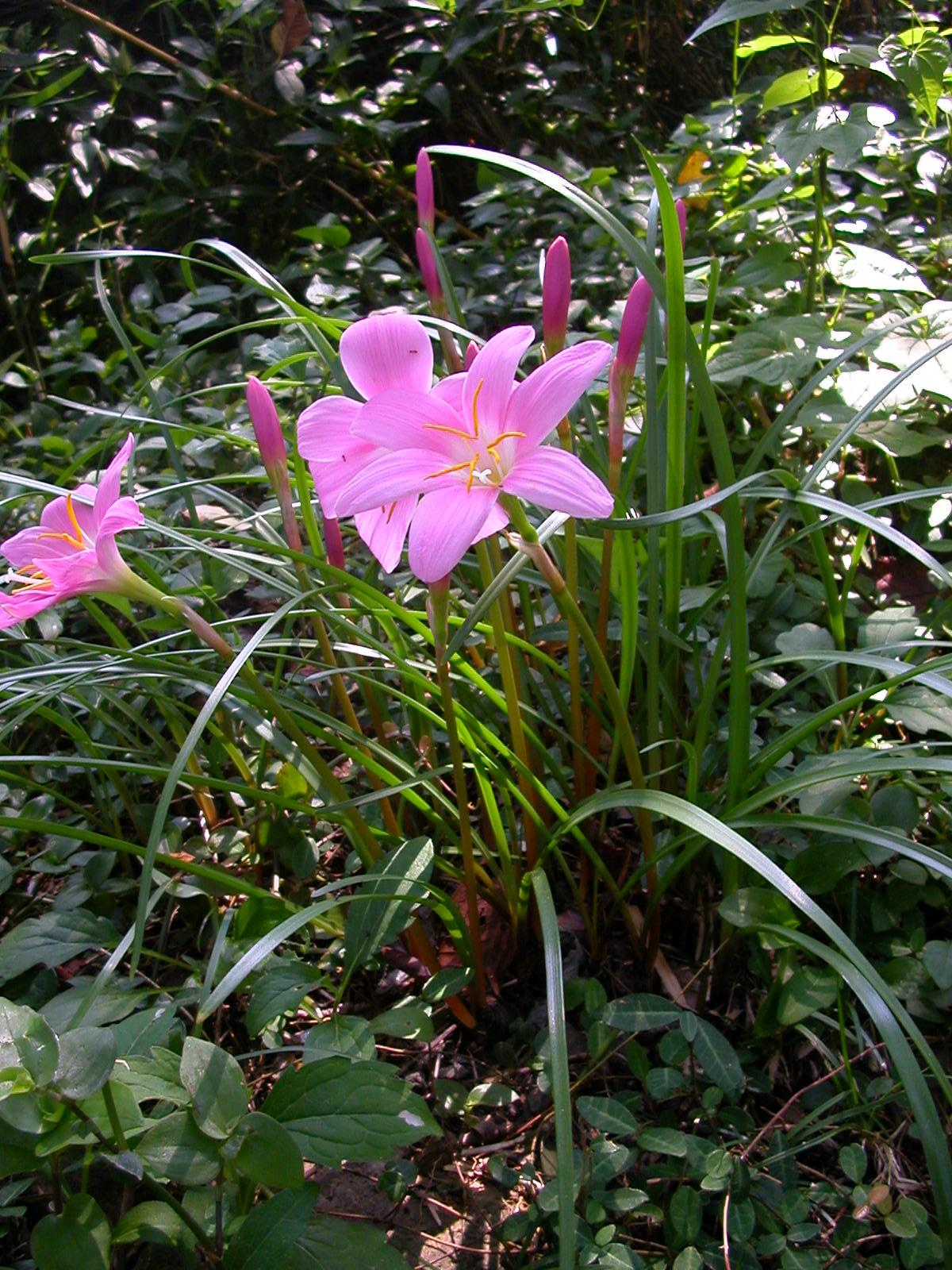 ゼフィランサス Zephyranthes carinata(静岡県西伊豆、日本:Nishiizu, Shizuoka pref. Japan)